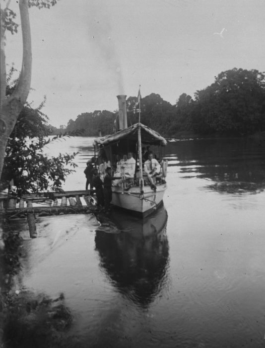 Foto. Assistent-resident Rademakers maakt met gasten een tocht per boot op de Tulang Bawang rivier bij Menggala